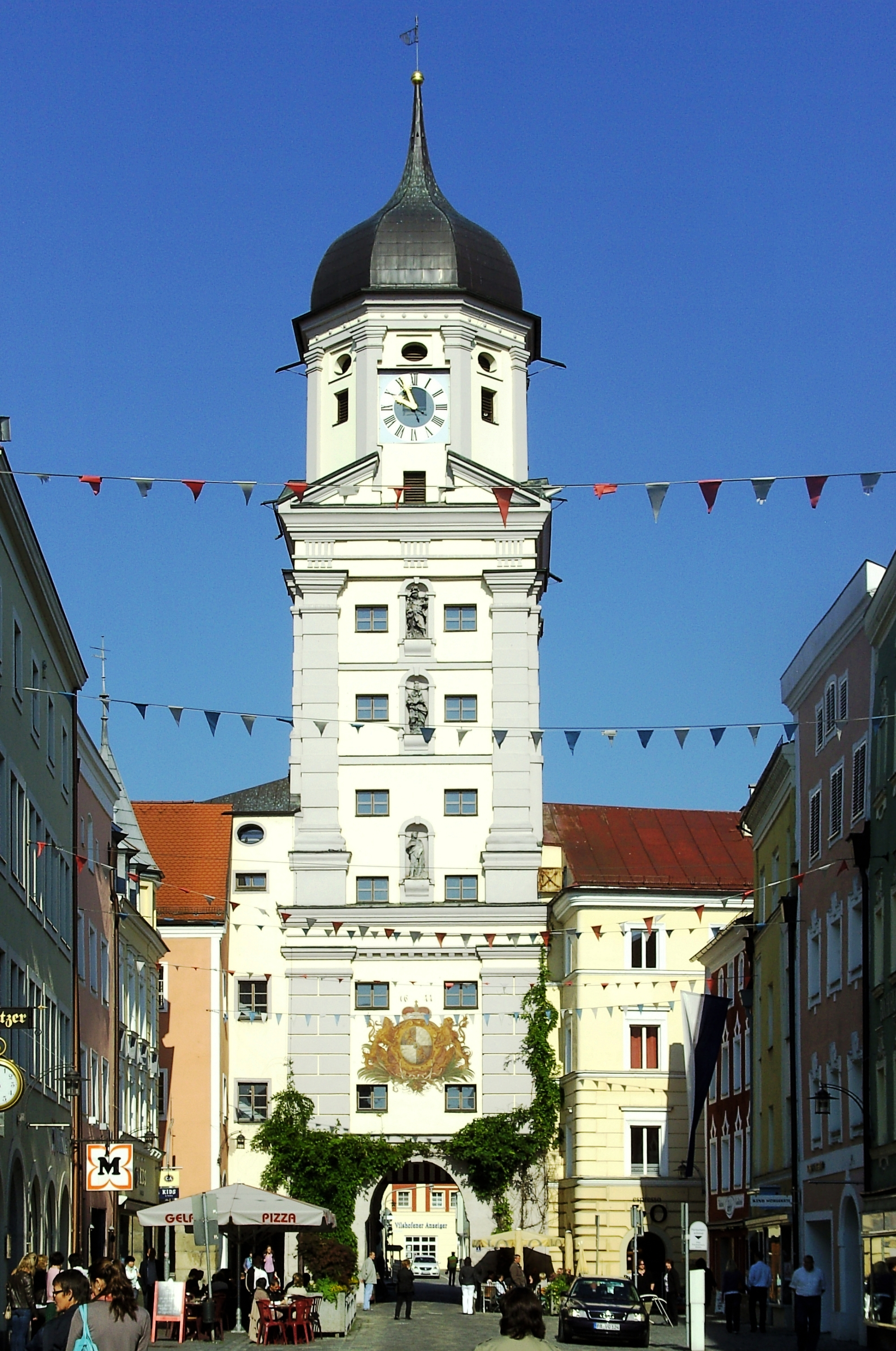 Der Stadtturm Vilshofen vom Stadtplatz aus gesehen.